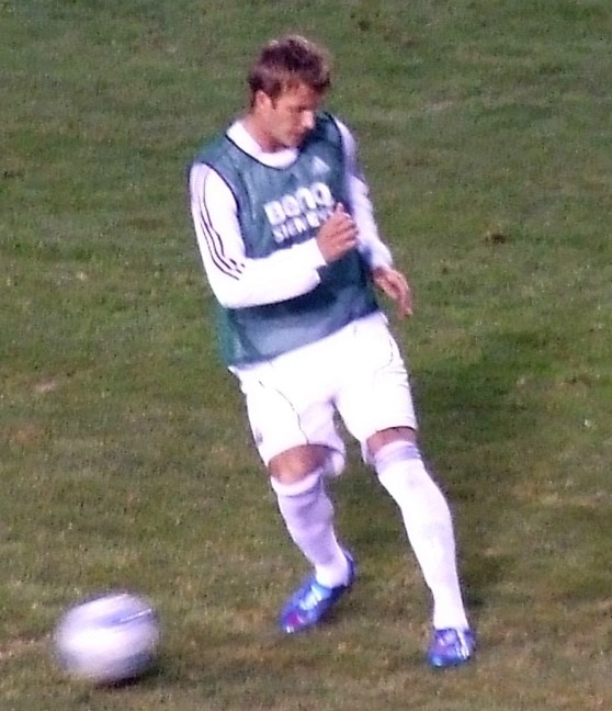 David Beckham: Real Madrid vs Real Salt Lake Futbol Game